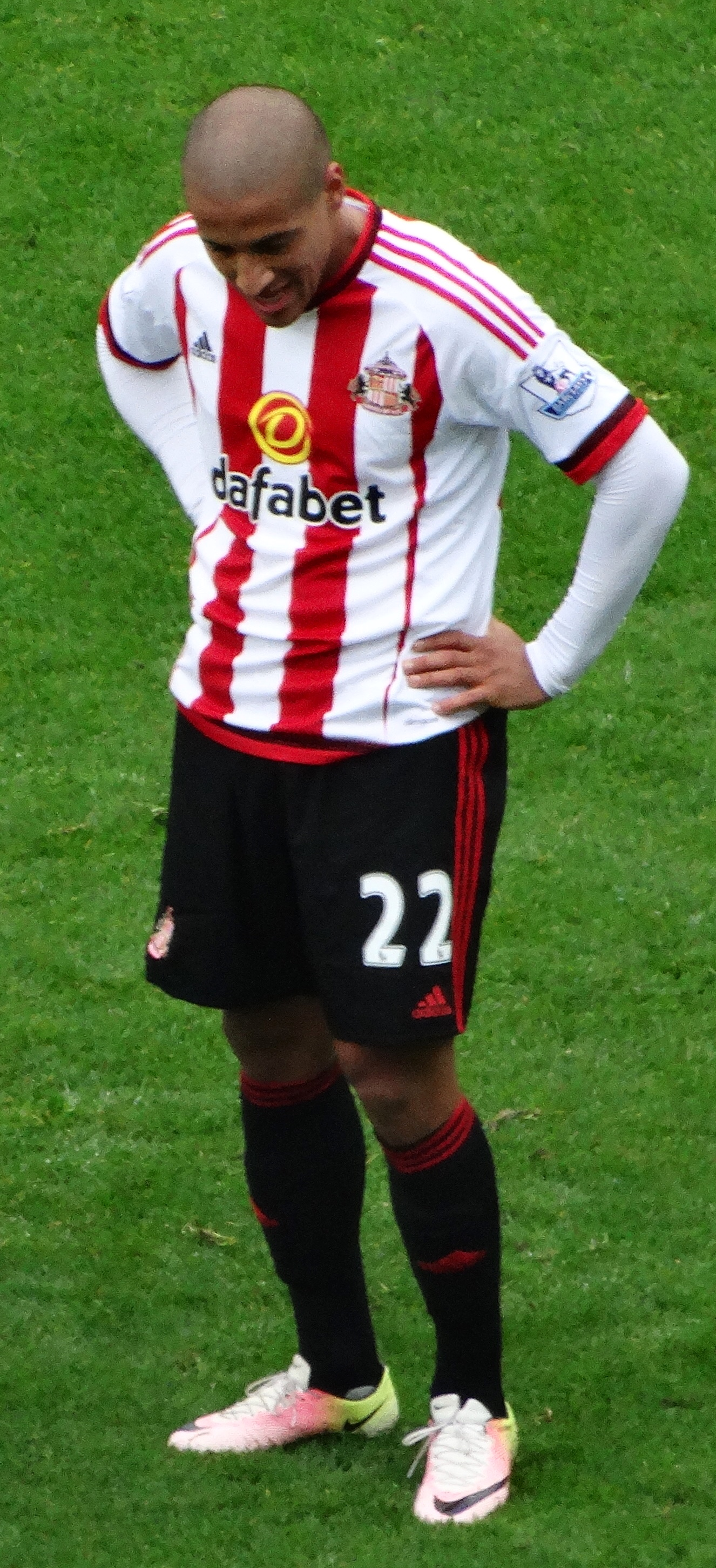 Sunderland 3 Chelsea2